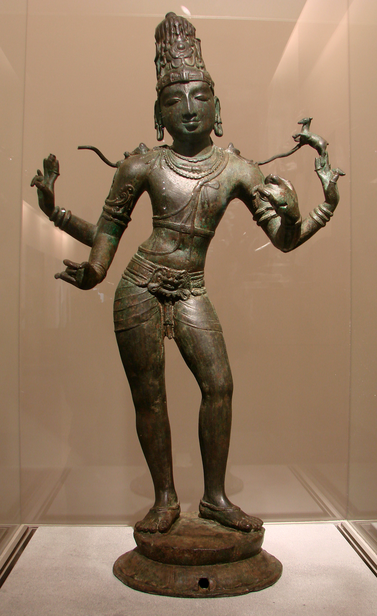 Shiva. Inde, Tamil Nadu, époque Chola, 11ème siècle. Musée Guimet, Paris.